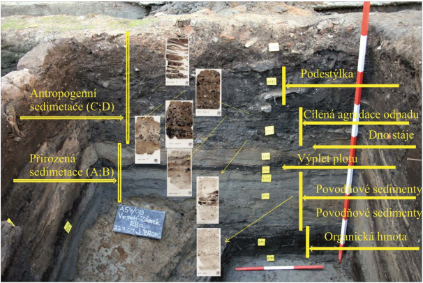 Ukázka